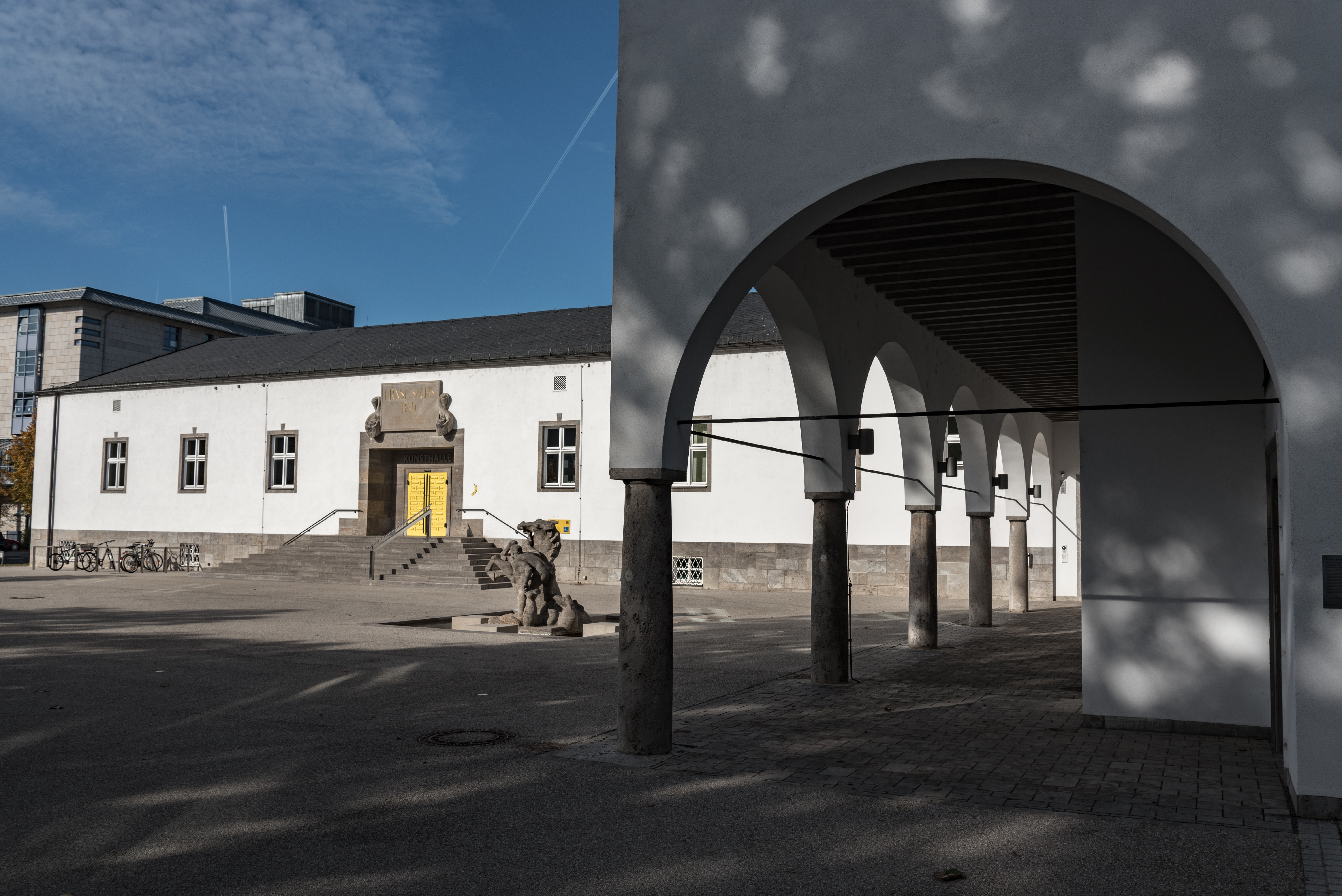 Schweinfurt, Sachs-Bad